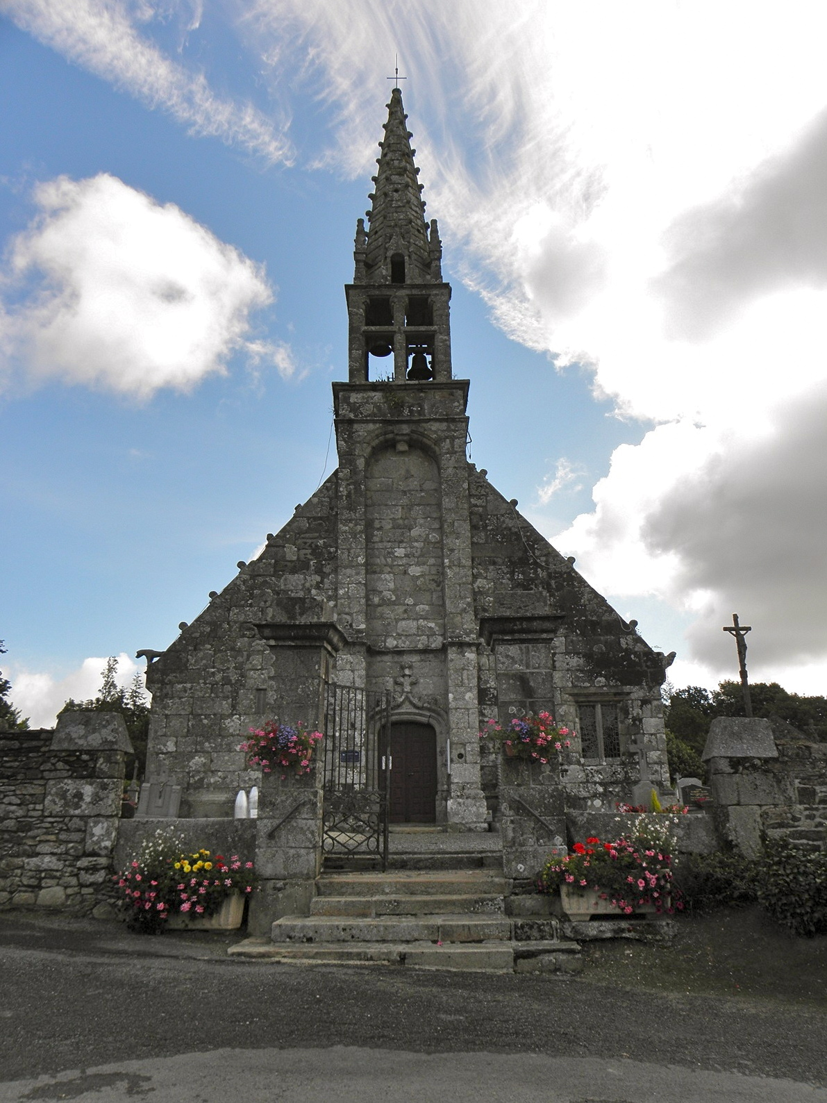 Façade principale de l'église Notre-Dame de Moustéru (22). .